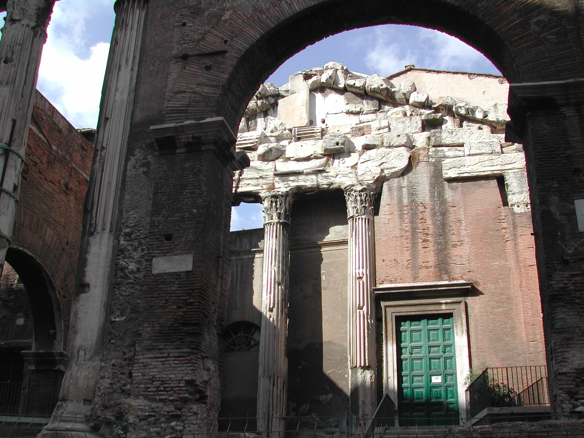 Roma, Portico di Ottavia